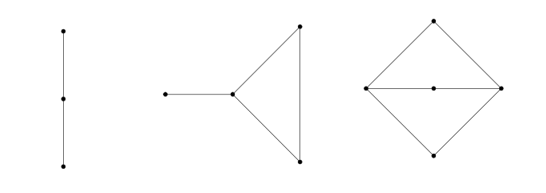 Ejemplos para probar la falsedad del pseudoteorema de rédei, que se difundió en una página española errónea de wikipedia durante años